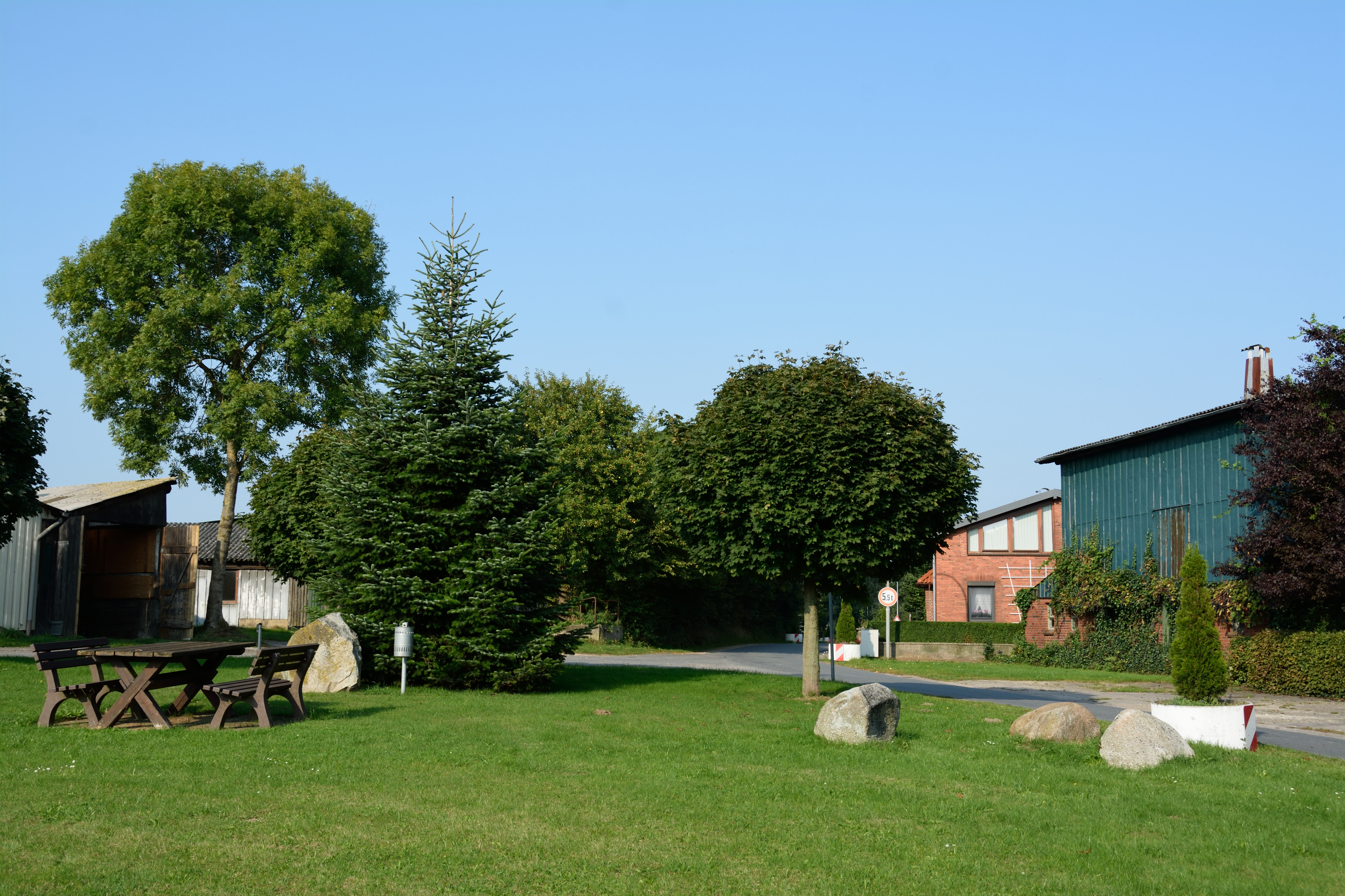 Impressionen aus Hadenfeld